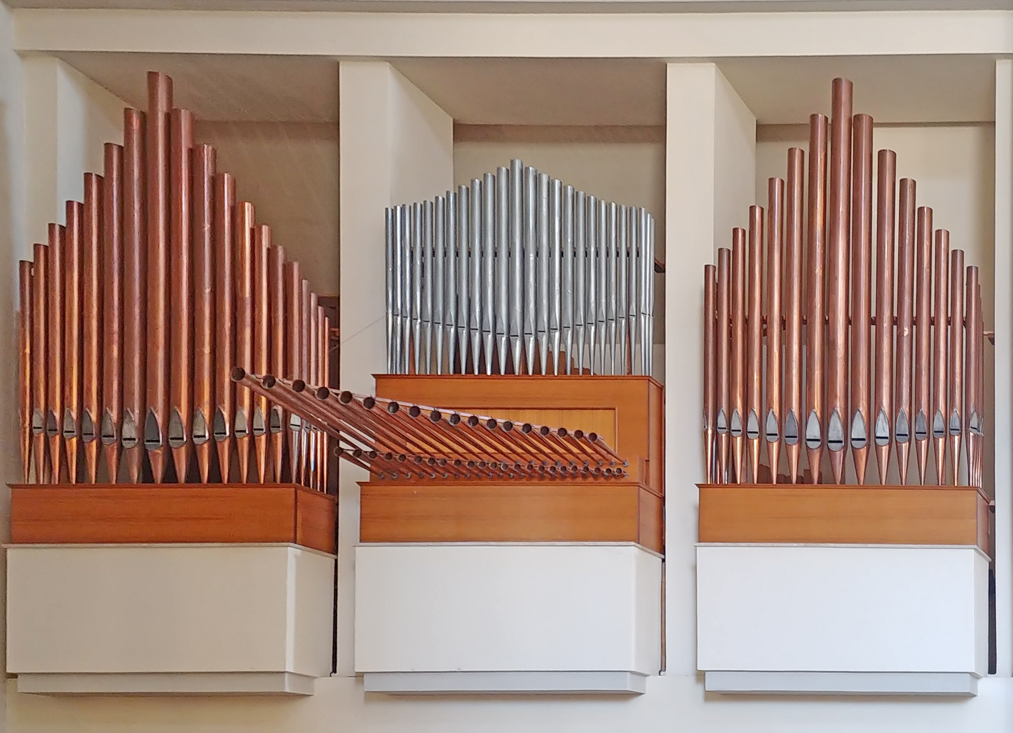 Organo Bevilacqua (24/II+P).